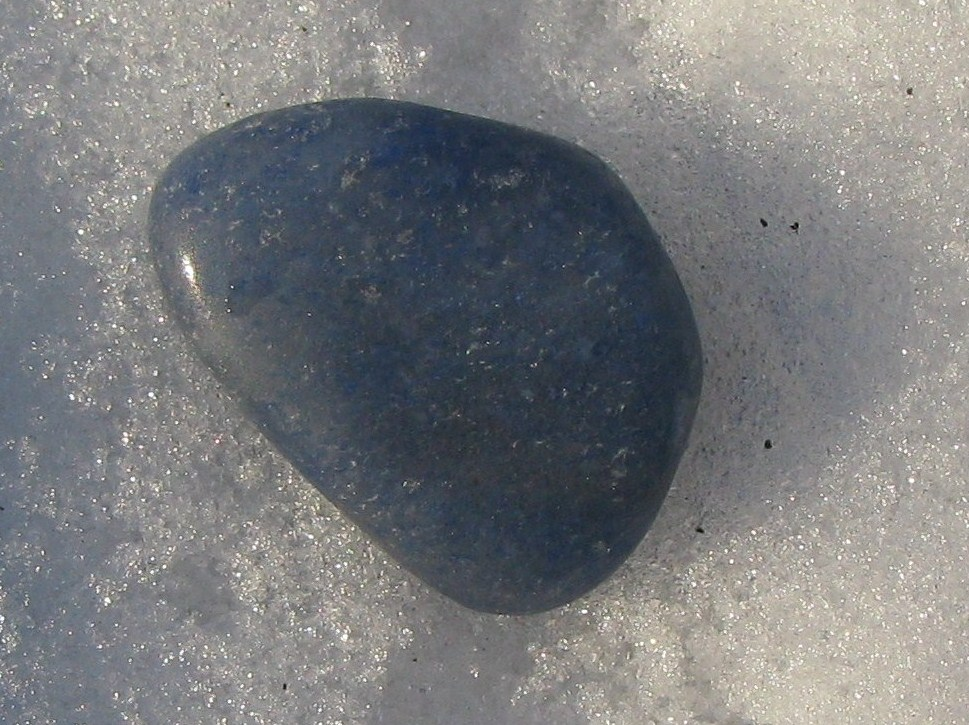 Ангеліт — різновид мінералу ангідрит